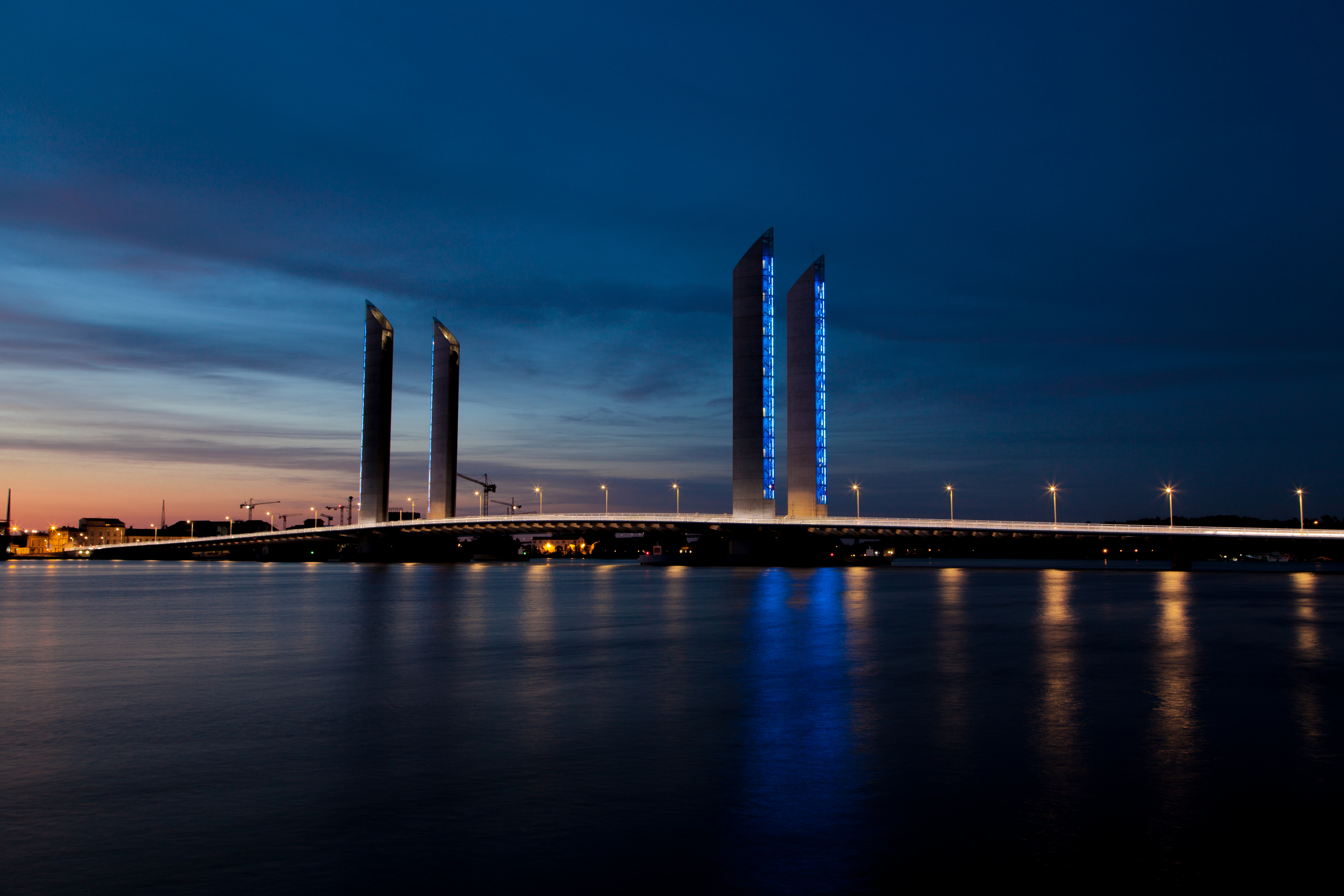 Le pont Jacques-Chaban-Delmas, ou pont Bacalan-Bastide, à Bordeaux, est un pont franchissant la Garonne entre le pont de pierre et le pont d'Aquitaine, il se situe dans le prolongement de la rue Lucien-Faure et relie le quai de Bacalan au quai de Brazza, au nord de La Bastide. Le conseil municipal de la ville de Bordeaux a décidé le 22 octobre 2012 de le baptiser du nom de « Jacques Chaban-Delmas », l'ancien maire de Bordeaux.